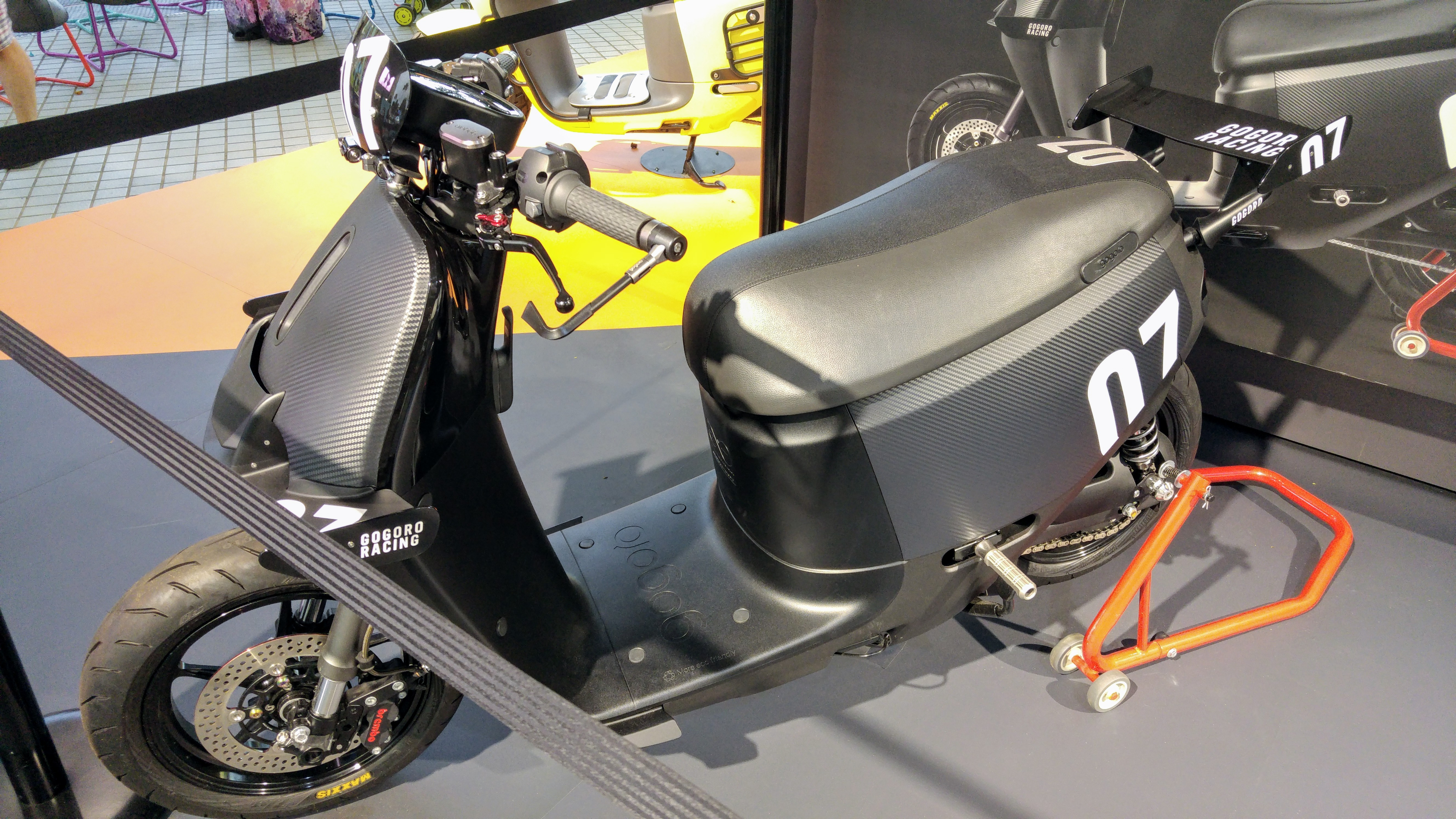 Gogoro 2 Series 上市初期所展示的競速型改裝車體。